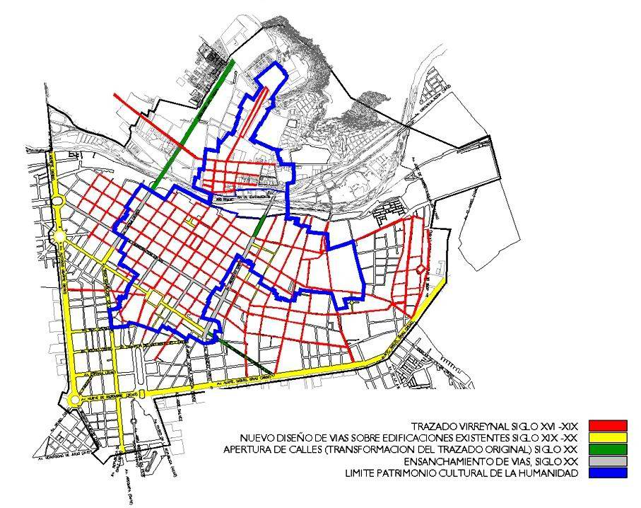 Plano del Centro Histórico de Lima Este plano ha sido dibujado por --Carlos Chacón 16:29 22 jun, 2005 (CEST) Categoría:Mapas (imagen)